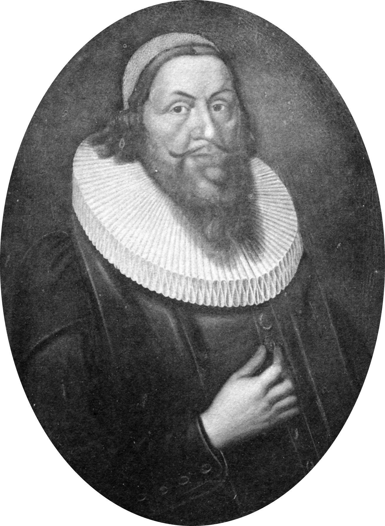 Jacob Stolterfoht (* 1600; † 1668), Lübecker Pastor und Theologe Porträt an Stolterfohts Epitaph in der Lübecker Marienkirche; 1942 vernichtet.